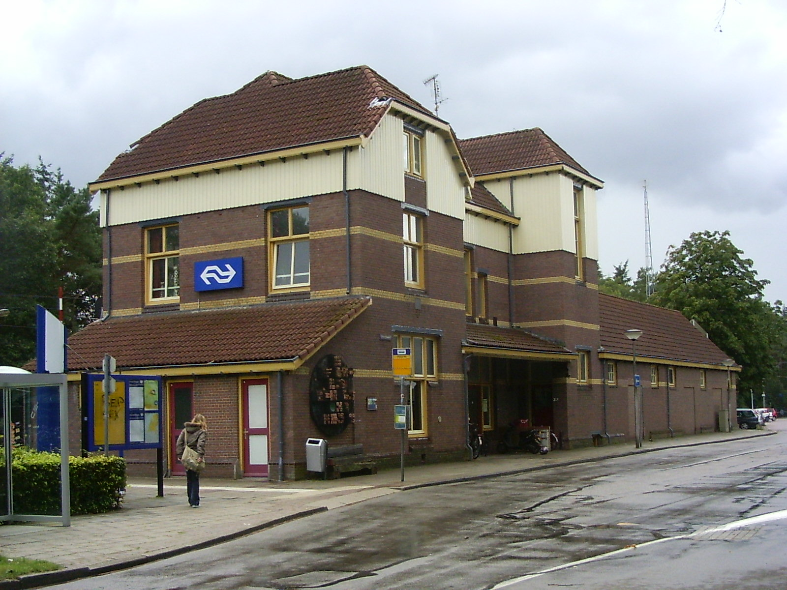 Station Ommen straatzijde